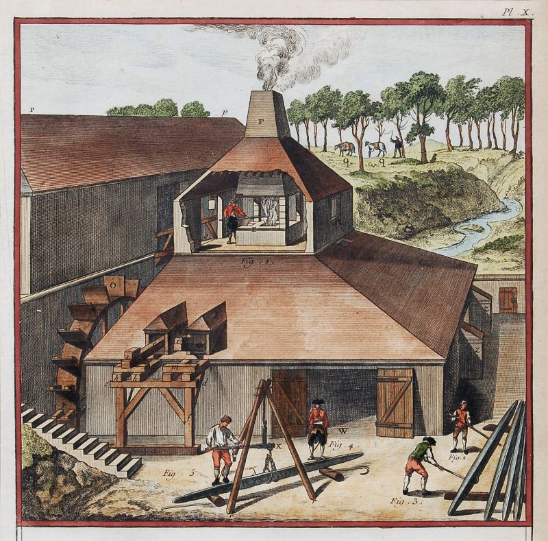 Planches de l'Encyclopédie de Diderot et d'Alembert, volume 3.